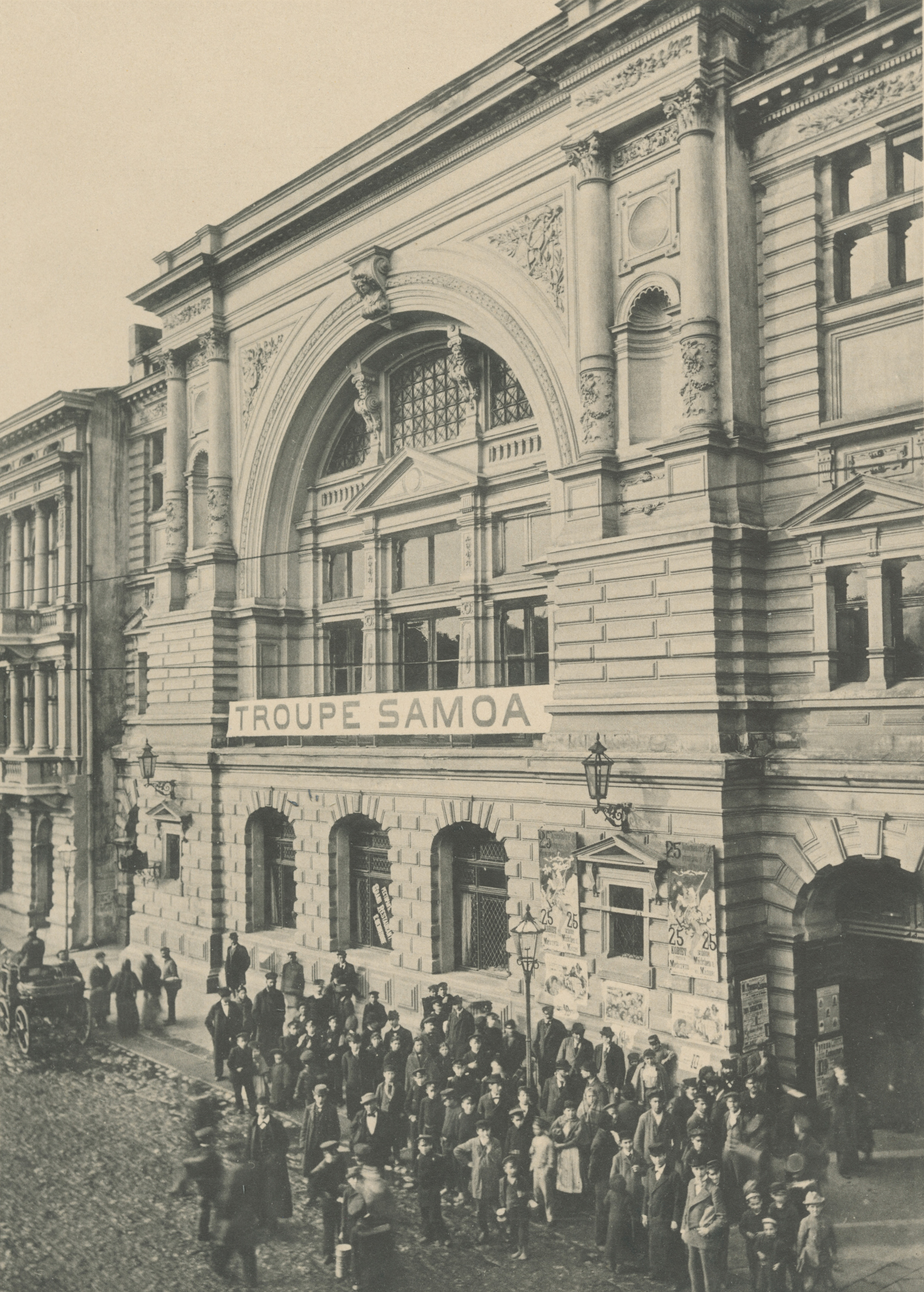 Fotografia przedstawia budynek Domu Koncertowego, który znajdował się przy ulicy Dzielnej (obecnie ulica Narutowicza). W latach 1885-1886 na posesji przy obecnej ulicy Narutowicza 20 Ignacy Vogel wzniósł Dom Koncertowy. Uroczyste otwarcie odbyło się 27 stycznia 1887 roku. Fasadę gmachu zdobiło ogromne arkadowe okno oraz kolumny. Na parterze znajdowała się restauracja, a nad nią sala koncertowa, którą Vogel wynajmował na występy muzyczne, wokalne, imprezy masowe, bale, akademie, odczyty, imprezy dobroczynne, a po 1915 roku również wiece polityczne. W sali koncertowali miedzy innymi Ignacy Paderewski czy Artur Rubinstein. Od wiosny 1916 roku występowała w nim założona w 1915 roku Łódzka Orkiestra Symfoniczna. Od 1921 roku budynek pełnił funkcję siedziby Filharmonii Łódzkiej. Zaraz po II wojnie światowej w latach 1947-1948 przeprowadzono generalny remont budynku podczas którego zniszczono neorenesansową elewację zachowując jedynie dużą niszę zamkniętą łukiem. W 1999 roku gmach całkowicie wyburzono i na oczyszczonej działce postawiono nowy budynek filharmonii według projektu Romuada Loeglera. Ulica przy której stała sala koncertowa przez około 100 lat była znana jako ulica Dzielna. Nazwę zawdzięczała swojemu usytuowaniu pomiędzy Nowym Miastem a osadą lniarsko-bawełnianą zwaną Łódką, które oddzielała od siebie. W 1924 roku nadano jej imię prezydenta Gabriela Narutowicza. Fotografia pochodzi z wydanego w 1896 roku albumu Bronisława Wilkoszewskiego „Widoki m. Łodzi”. Saryusz Bronisław Paweł Wilkoszewski (1847-1901), zwany "łódzkim Canaletto" był mistrzem fotografii ilustracyjnej. Udokumentował zabudowę Łodzi z końca XIX wieku przede wszystkim wille, fabryki, budynki użyteczności publicznej, obiekty sakralne, ulicę Piotrkowską. Jego zakład fotograficzny znajdował się w willi "Trianon" w Pasażu Meyera 5 (obecnie ulica Moniuszki).